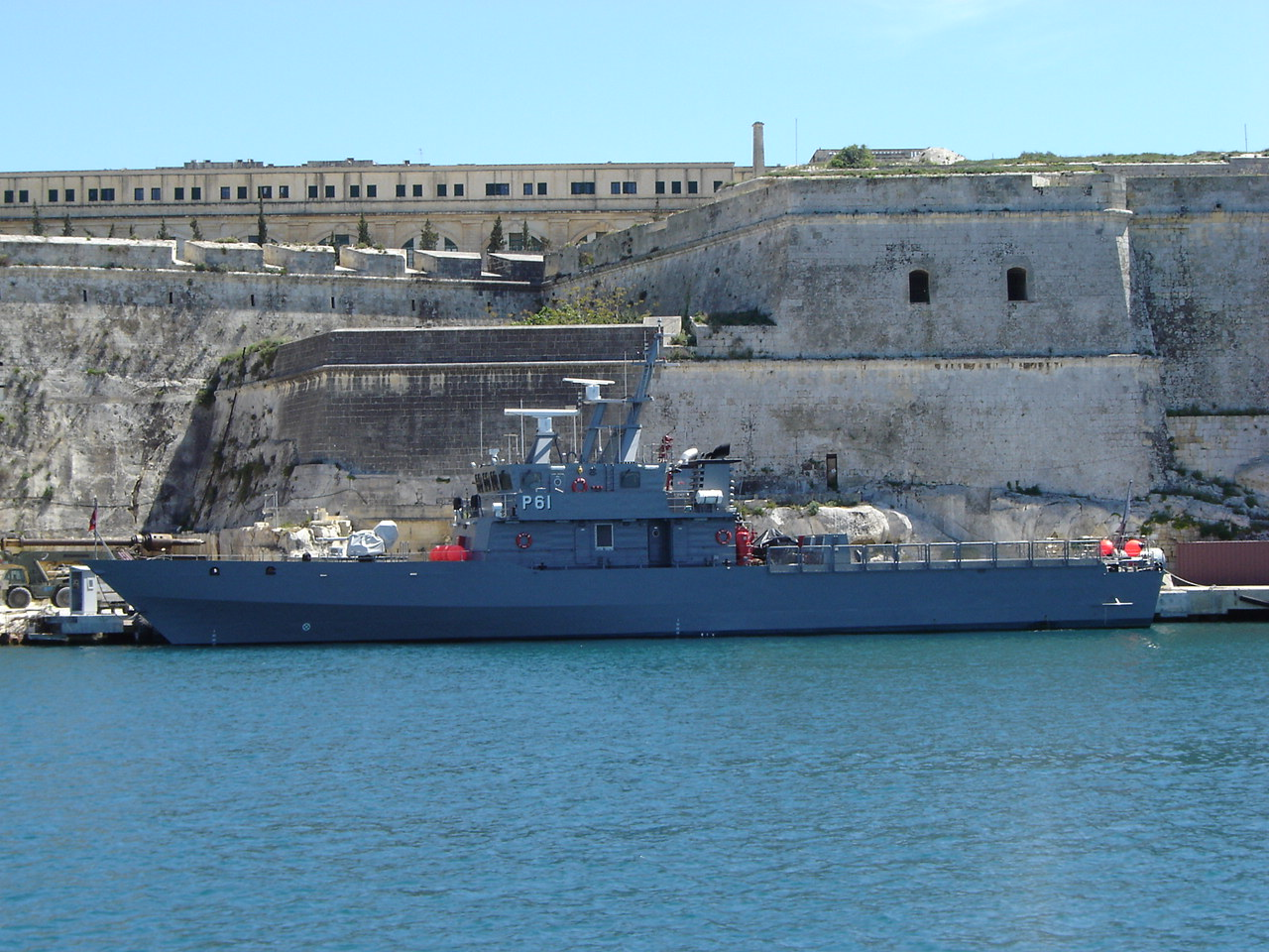 Patroullienboot der Diciotti-Klasse (Flaggschiff der Maltekischen Marine). Siehe auch [1] Militärisches Boot. Genaue Deklaration vonnöten, daher Hochladung hier. Malta April 2006.